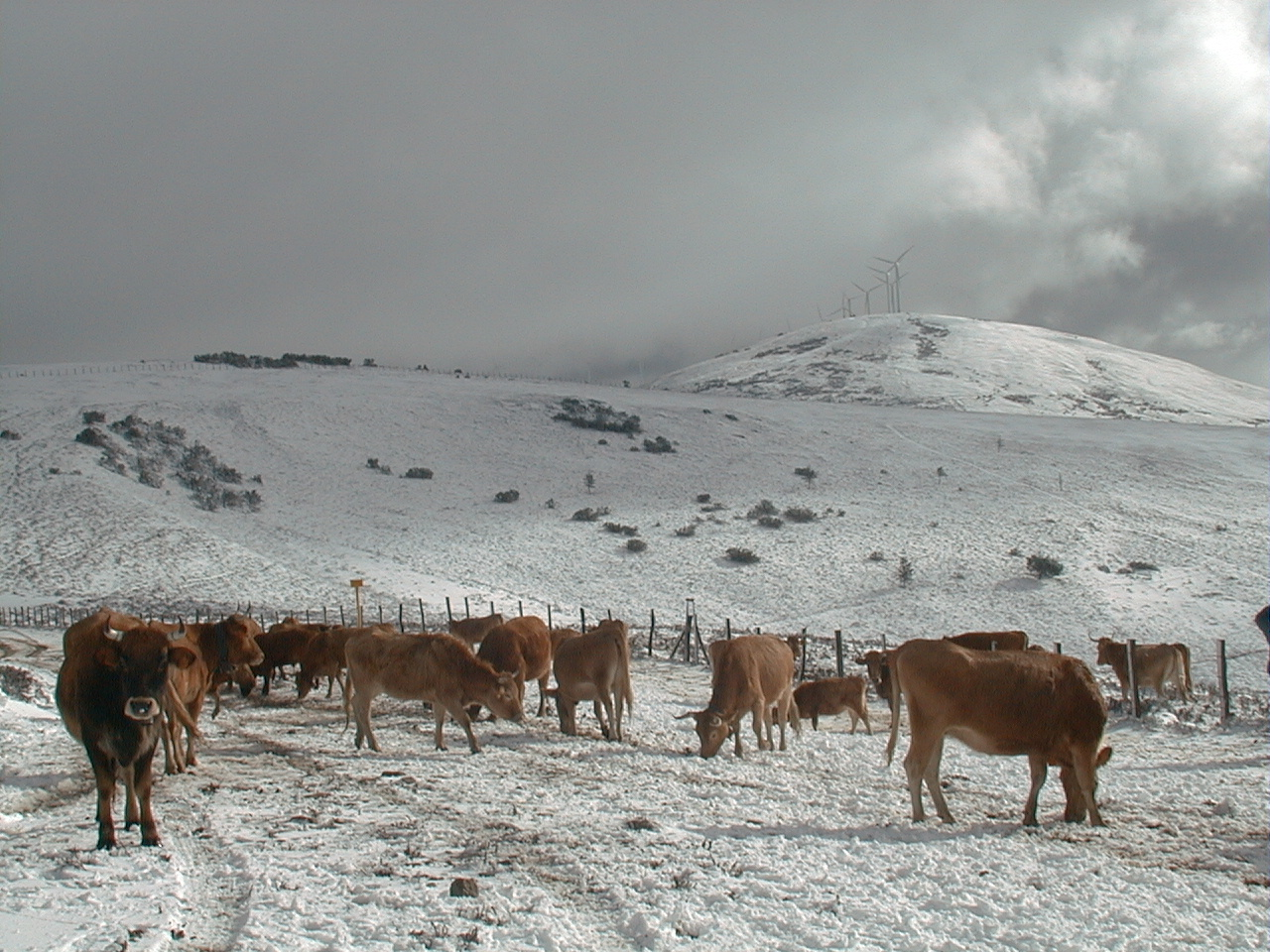 Behi betizuen taldea Elgeako mendilerroan. Atzean haize-errotak ikusten dira.